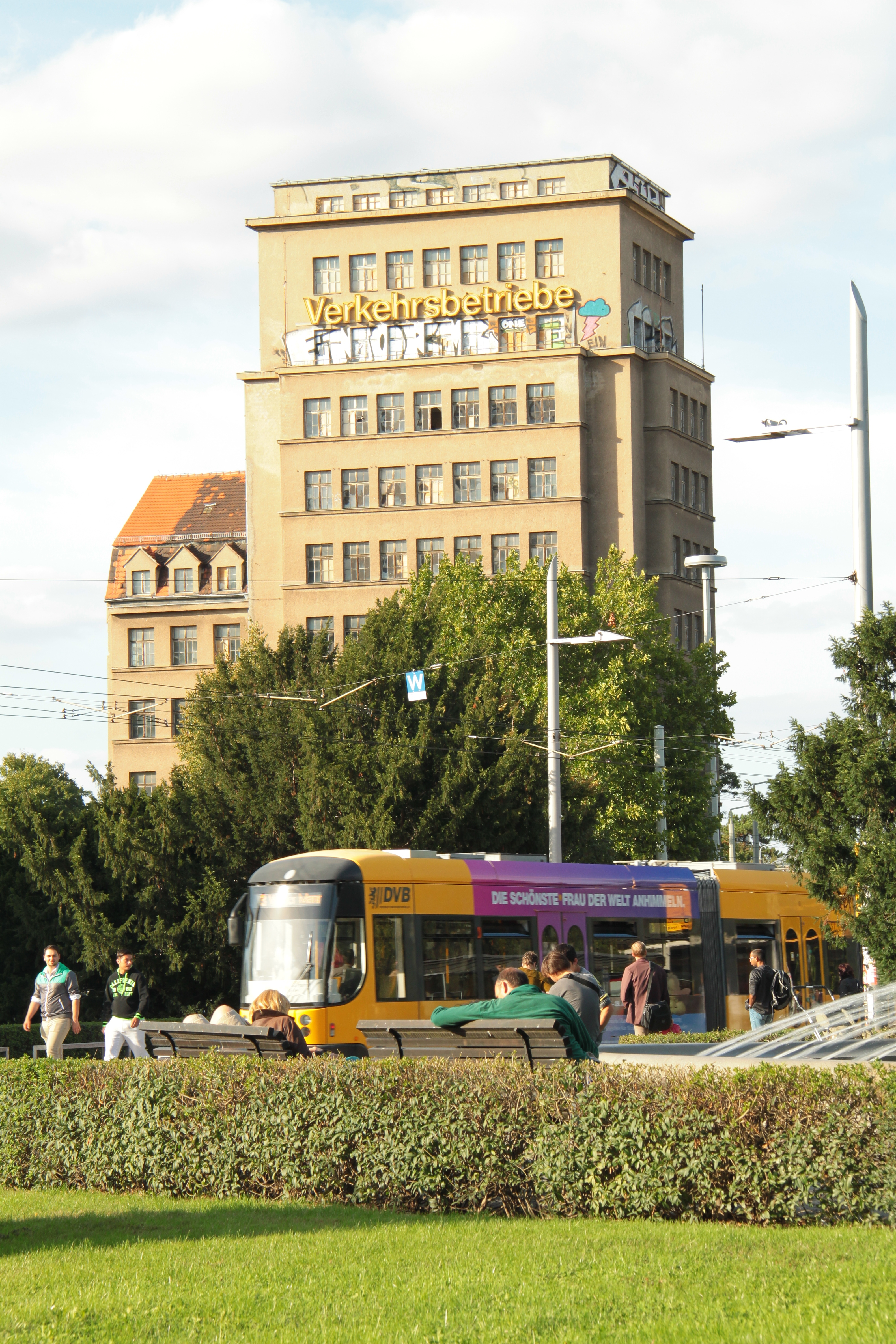 Impressionen Dresden